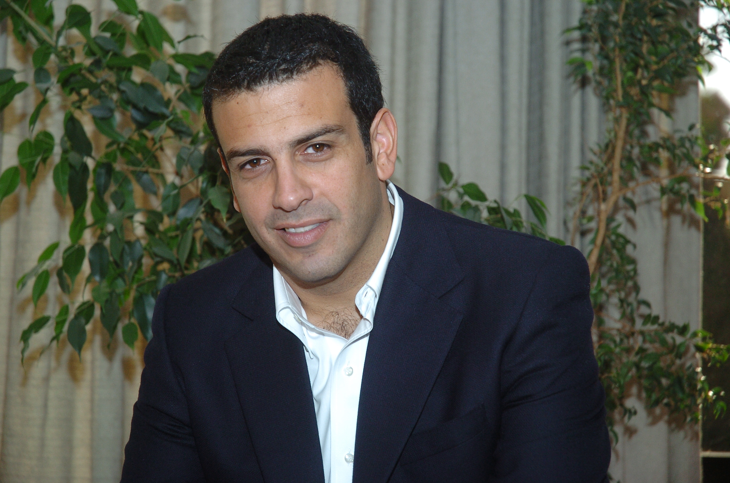 Rodrigo Delgado Alcalde de la Municipalidad de Estación Central, periodo 2008 -2012